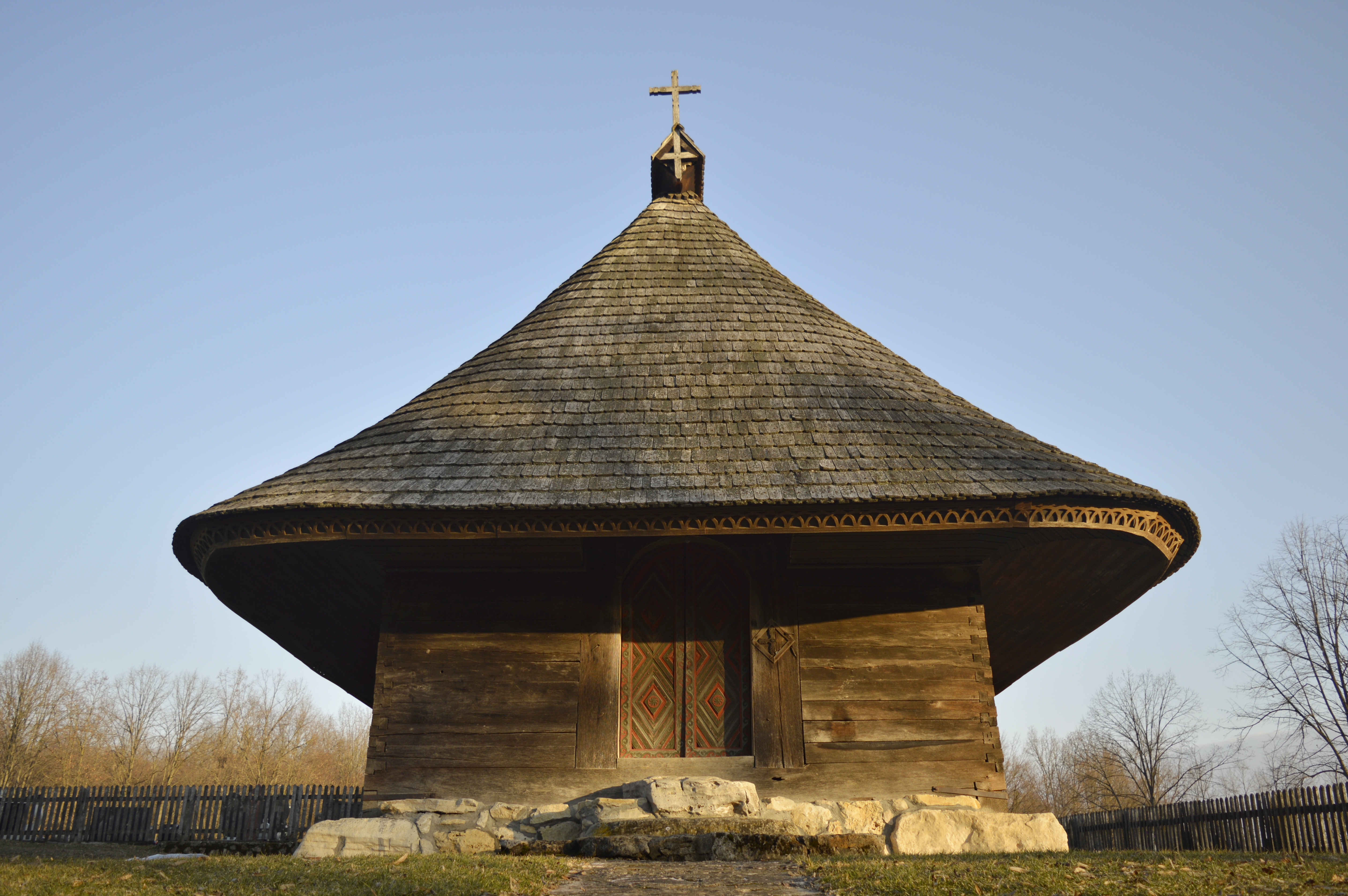 Crkva brvnara u Palackovcima|NKD550